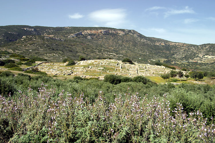 Die minoische Siedlung Gournia